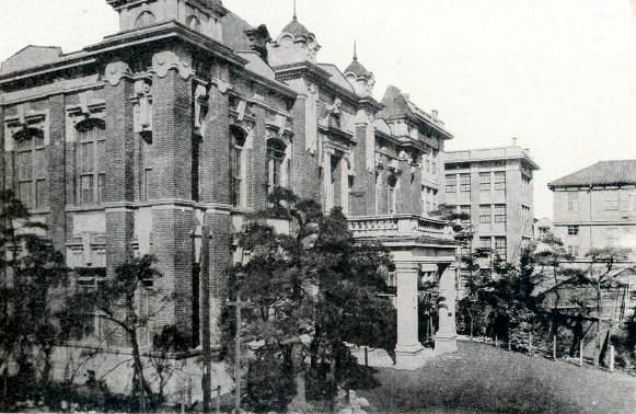 明治大学第二代記念館